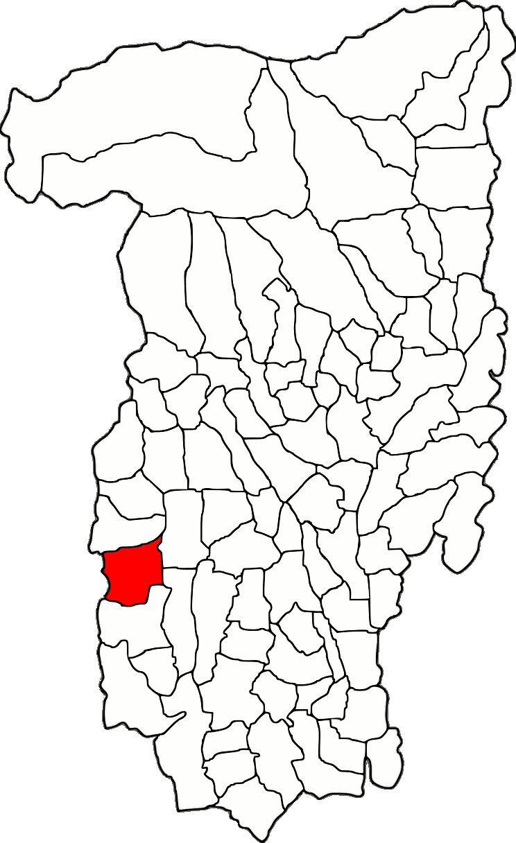 Lage der Gemeinde Livezi im Kreis Vâlcea (RO).